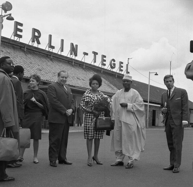 Ankunft des nig. Inform. Min. Benson Flughafen Tegel (T.O.S. Benson und Ehefrau - nigerianischer Informationsminister)